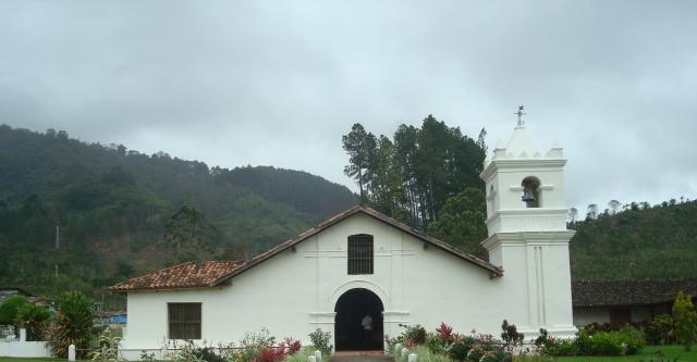 Fachada de la Iglesia de San José de Orosi, en Paraíso de Cartago, Costa Rica.